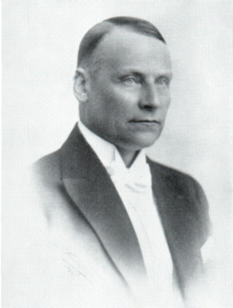 Axel Sterne, kommunalborgmästare i Mjölby från 1922 med mera.